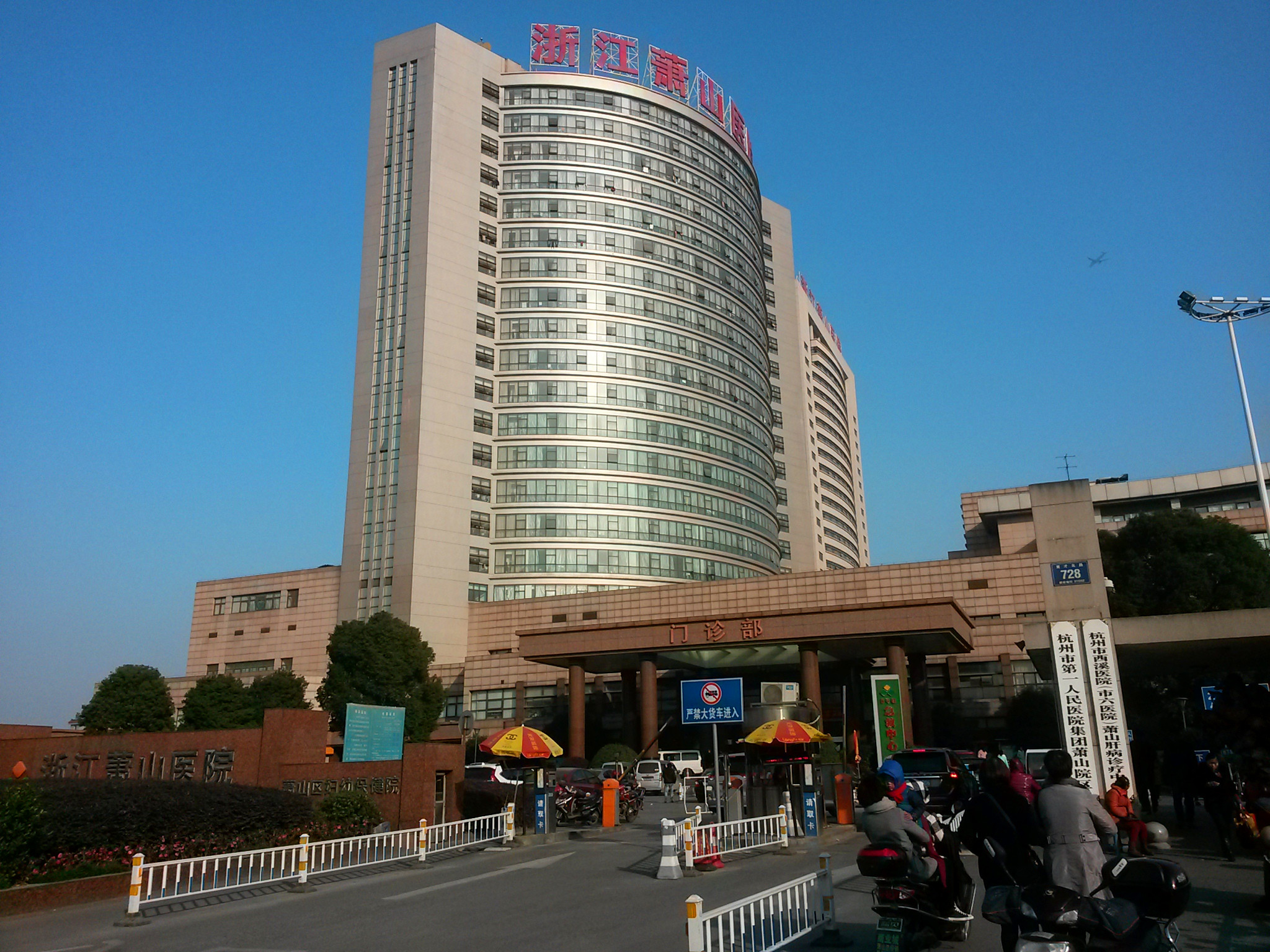 中文（中国大陆）: 浙江萧山医院